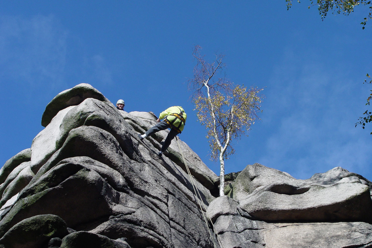 Kletterer beim Abseilen